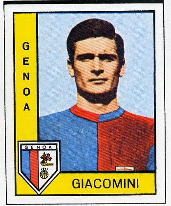 Massimo Giacomini che indossa la maglia del Genoa